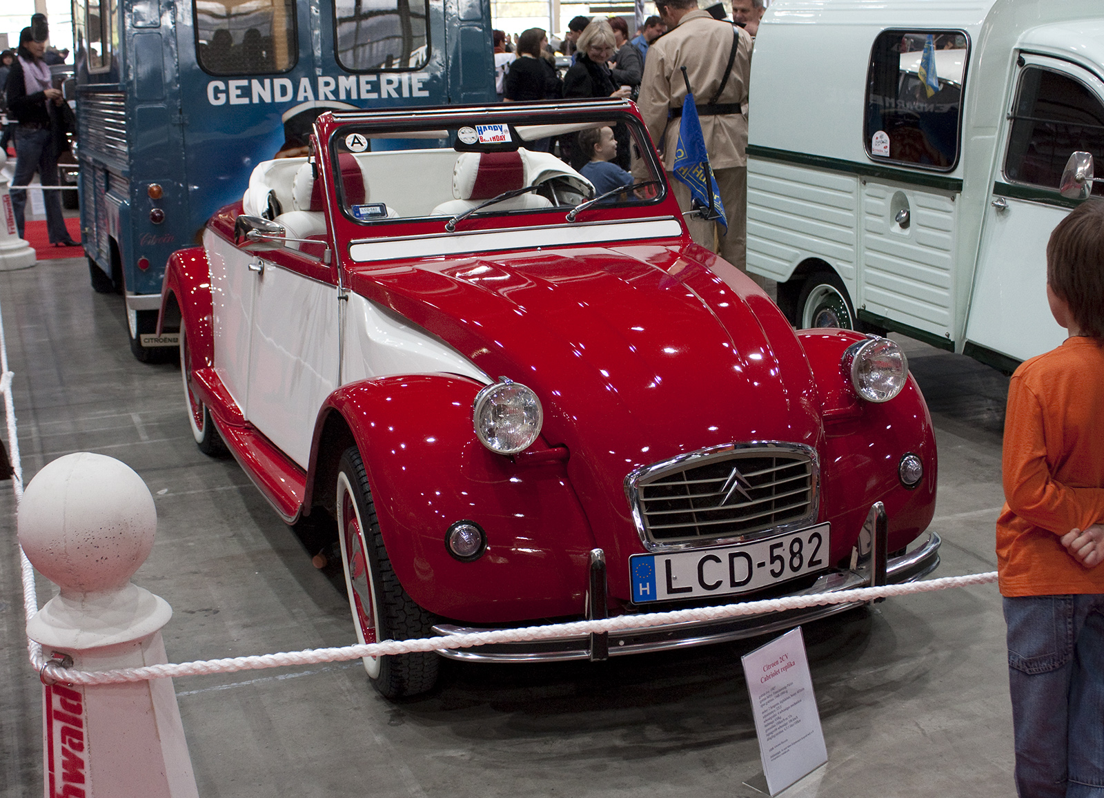 Citroen 2CV Cabriolet